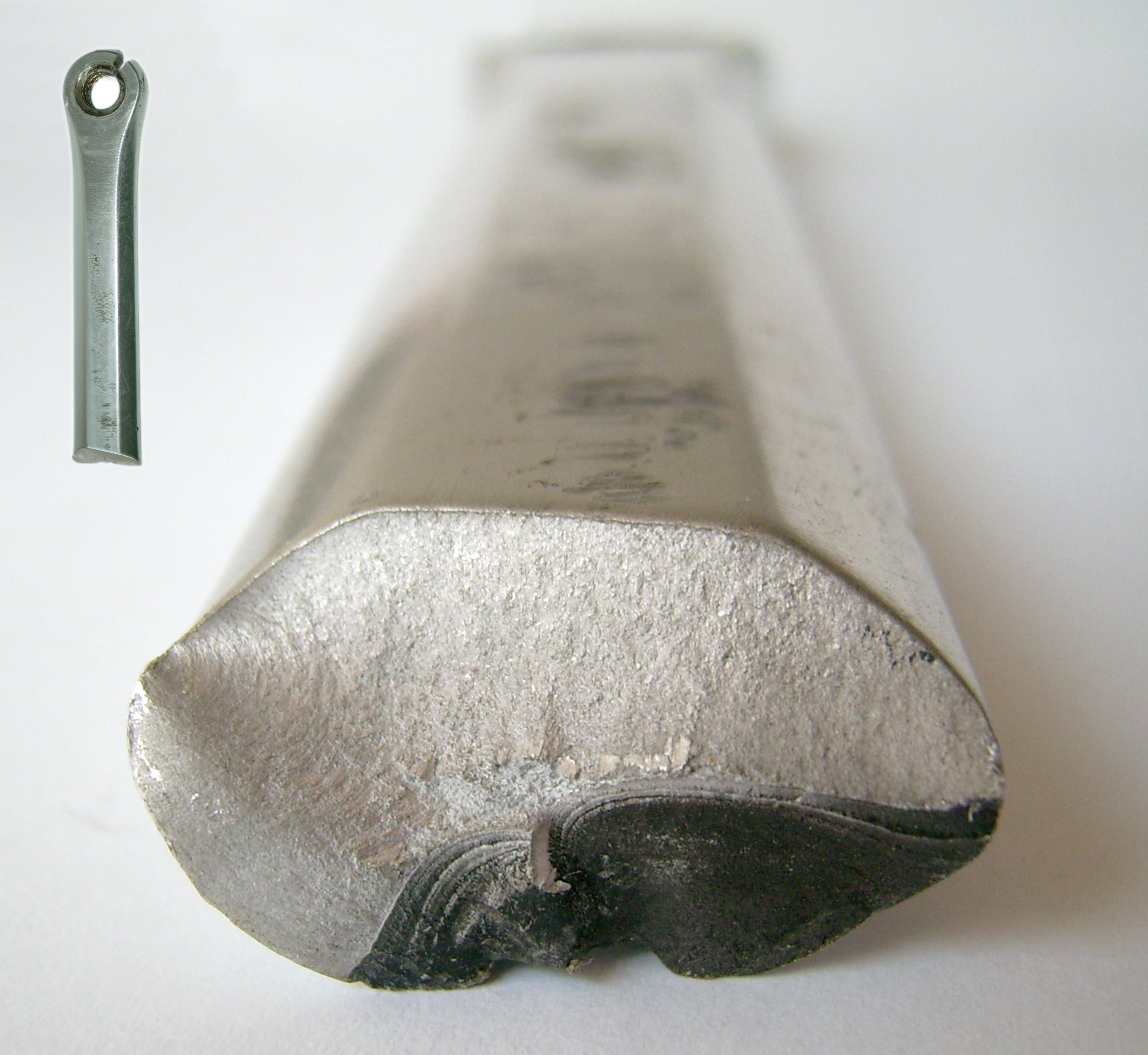 Ermüdungsbruch meines Fahrradpedalarmes (Kettler Alu-Rad von etwa 1990), hell: der Spröd-, Gewaltbruch, dunkel: der Ermüdungsbruch mit Rastlinien